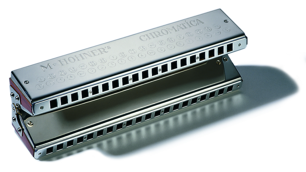 Hohner Doppeloktavbass